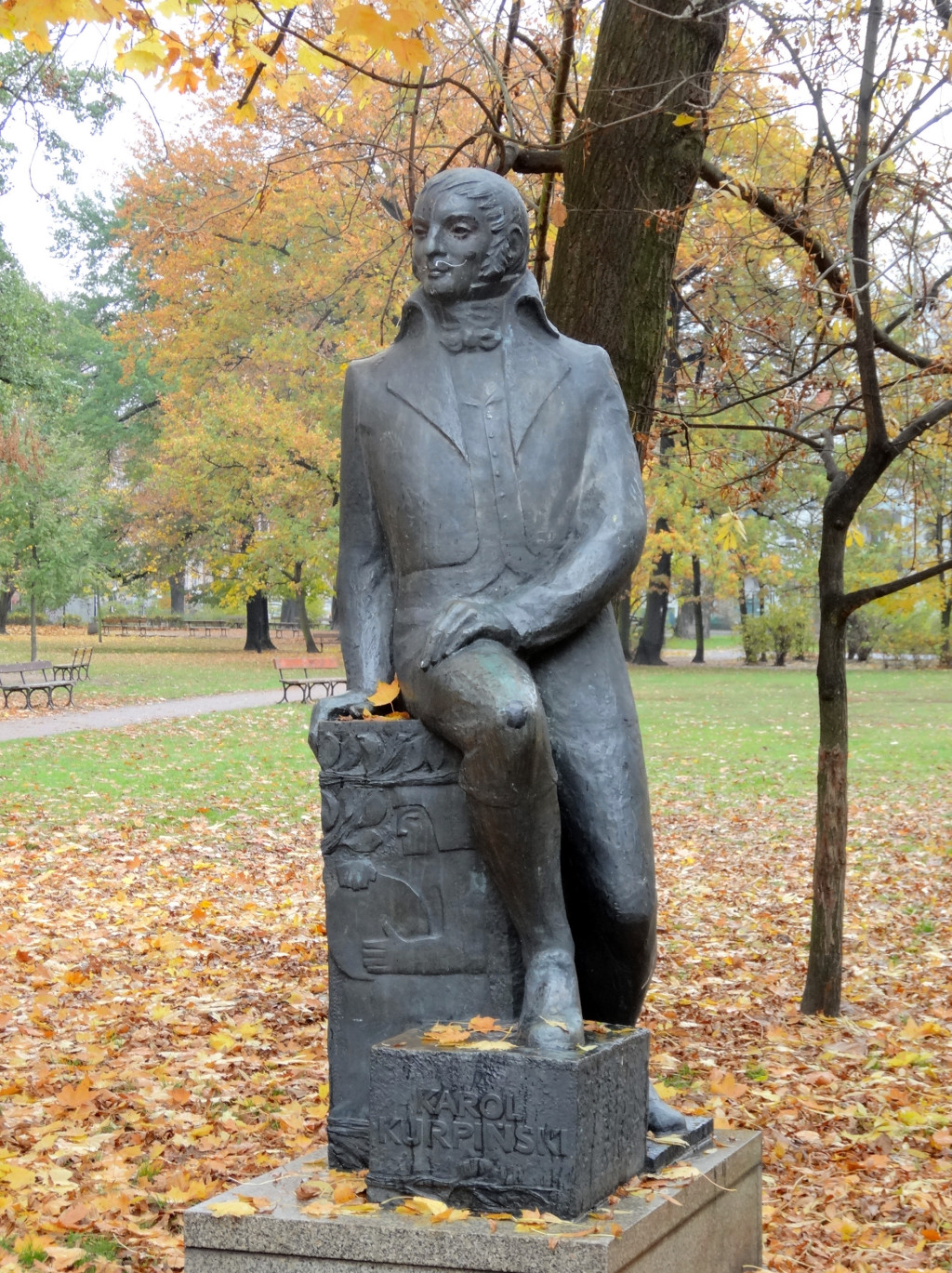 Posąg Karola Kurpińskiego w parku im. Jana Kochanowskiego w Bydgoszczy